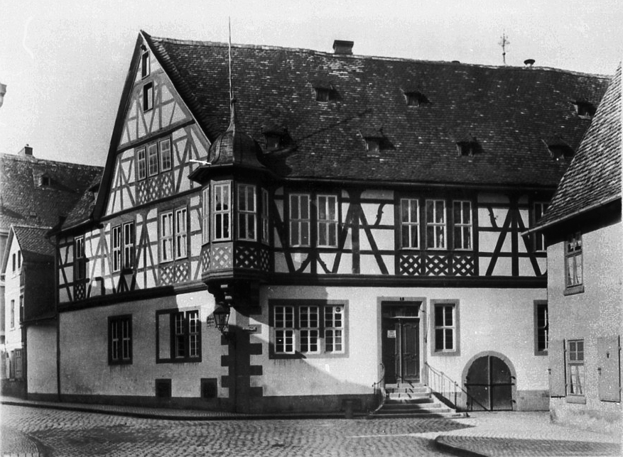 Kommandantur (17. Jahrh.), Erbsengasse 1/Ecke Schlossstraße.